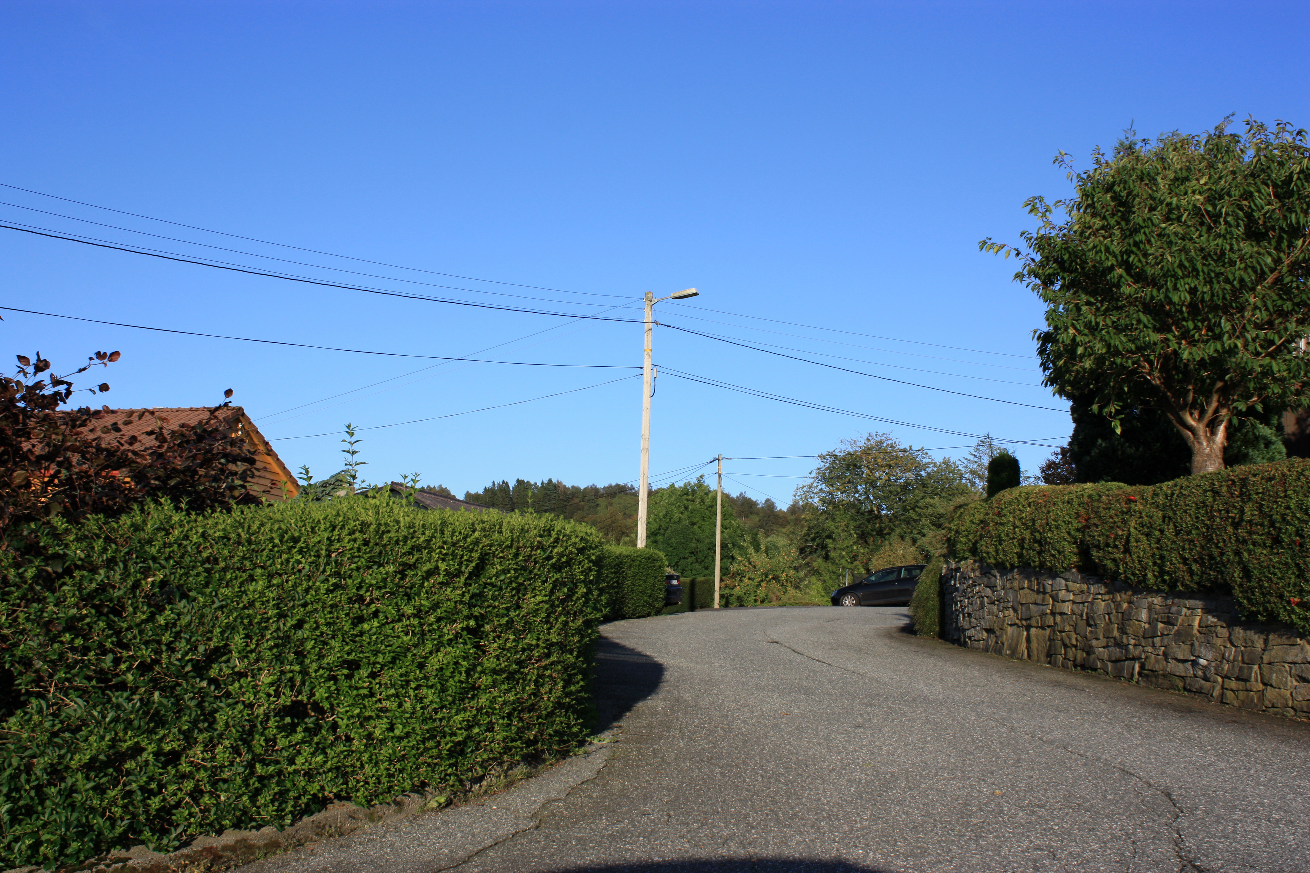 Nordrevoll, Fana, Bergen.